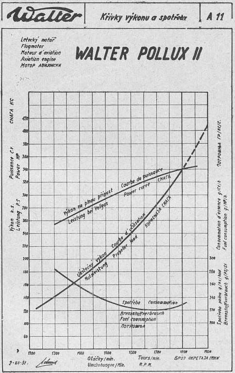 Walter Pollux II (charakteristiky leteckého motoru)